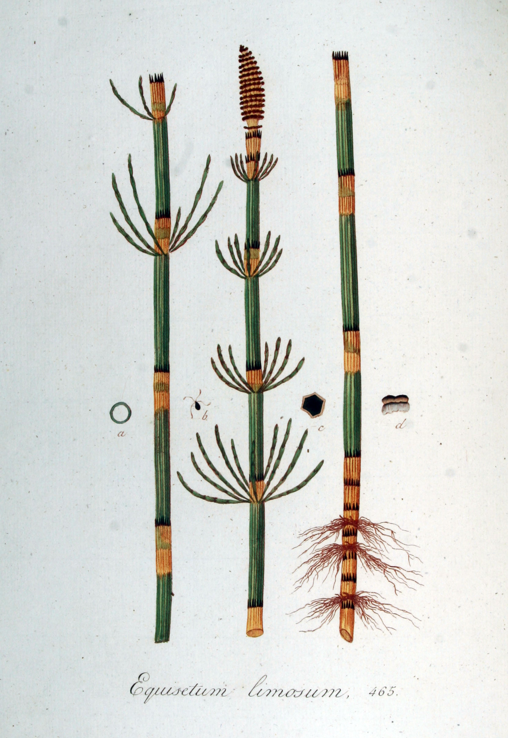 Equisetum fluviatile L. (Syn. Equisetum limosum L.)